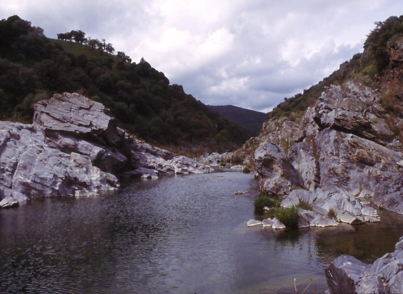 río Víar por debajo del embalse del Pintado